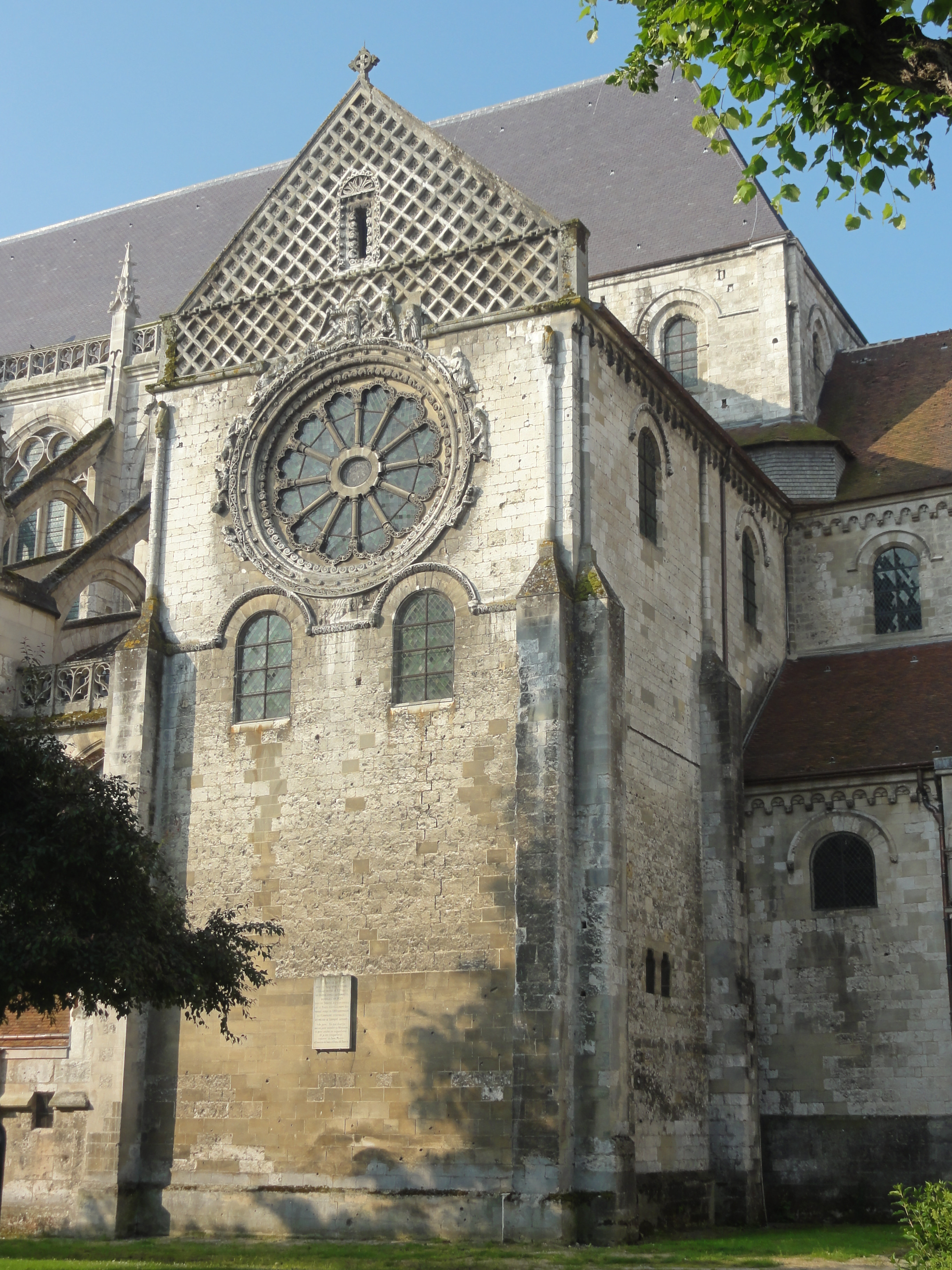 Croisillon nord, vue depuis le nord.